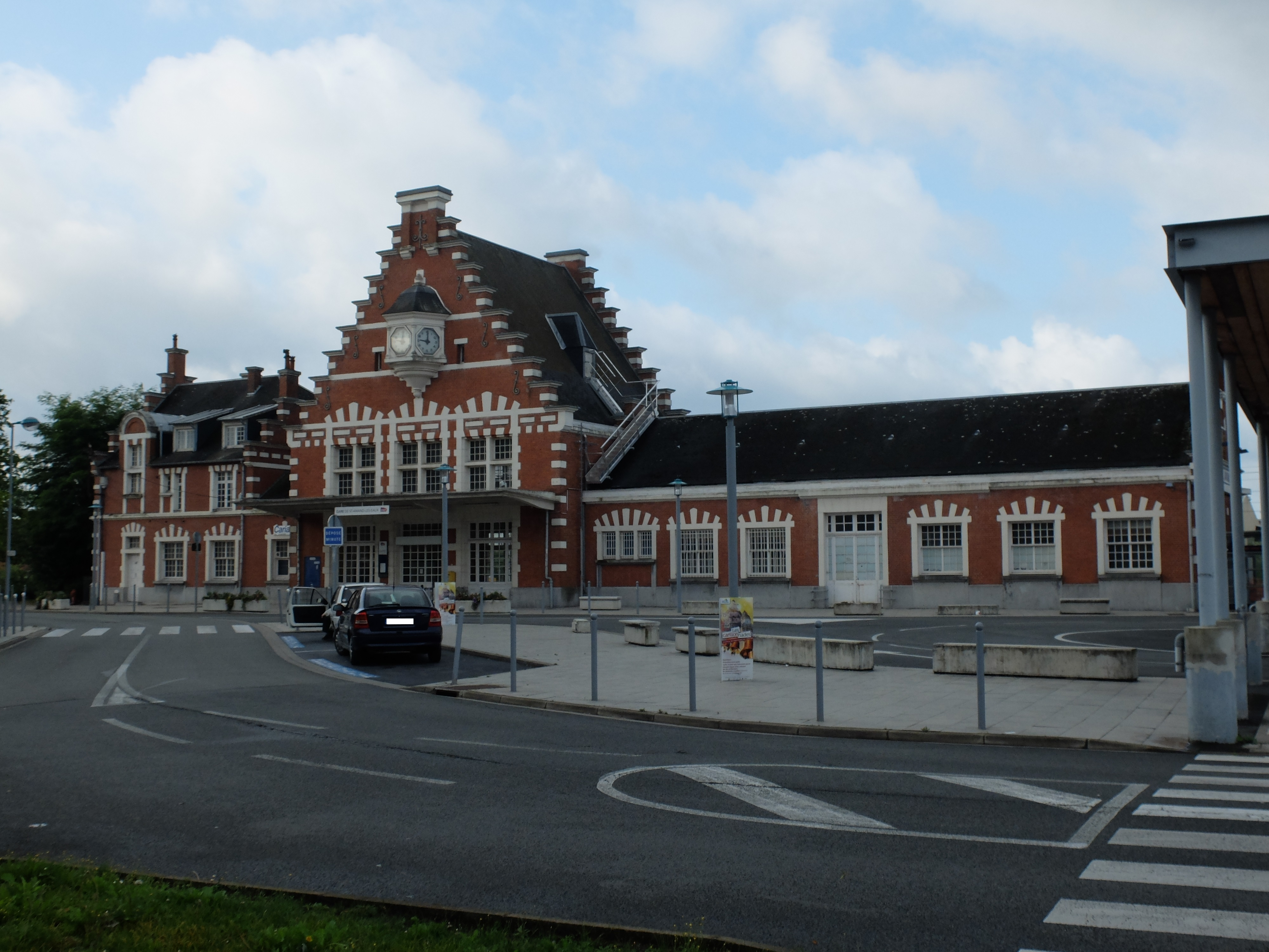 Vue du bâtiment voyageurs de la gare de Saint-Amand-les-Eaux.